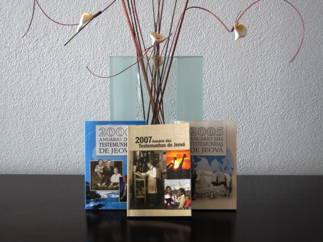 Anuário das Testemunhas de Jeová 2007.